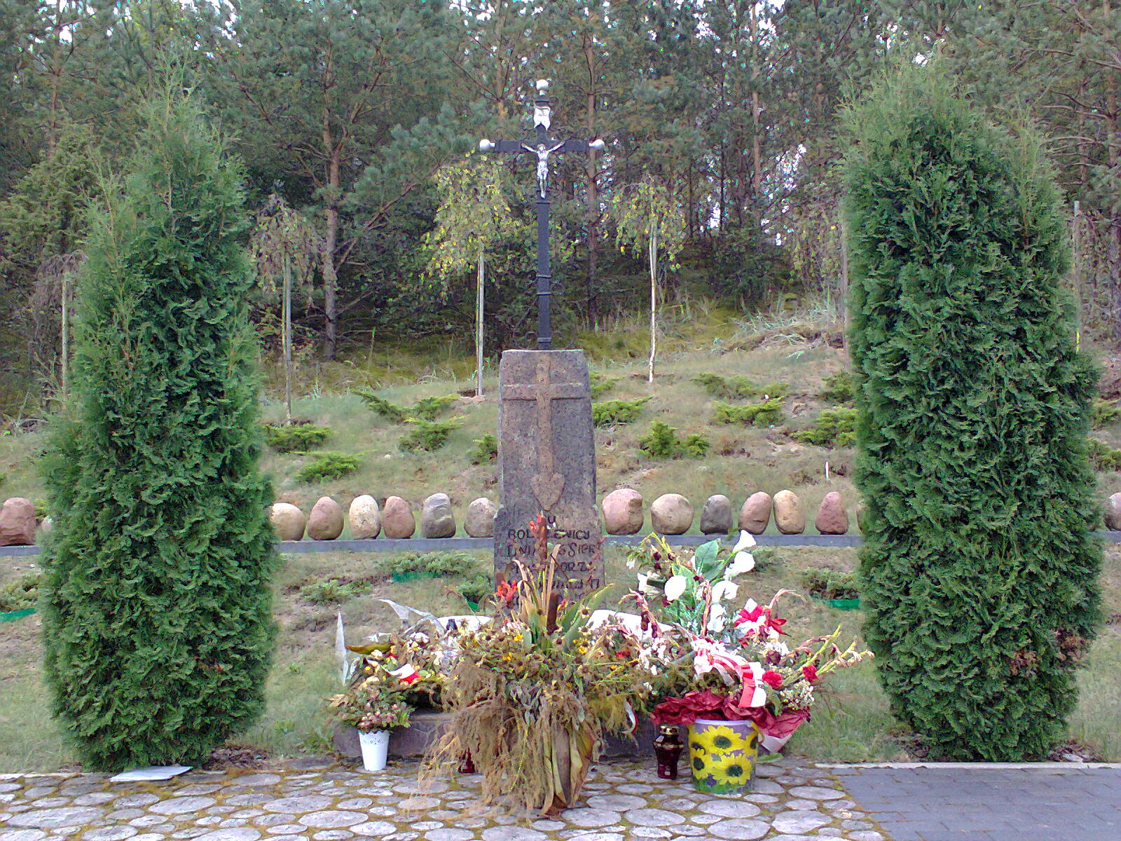 Pomnik w Lemanie (powiat kolneński)